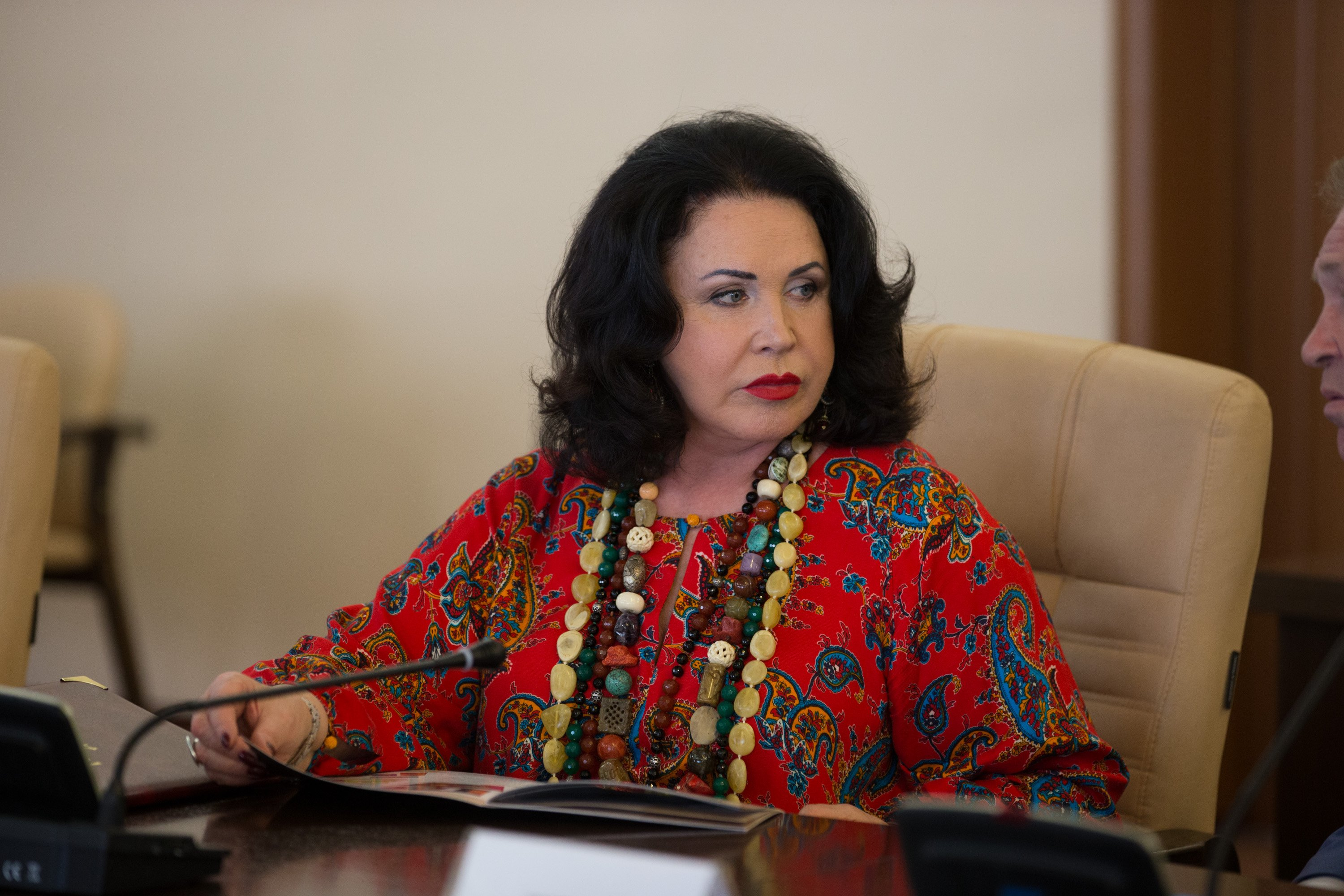 Надежда Бабкина на Заседании секций в рамках VI Парламентского форума «Историко-культурное наследие России»